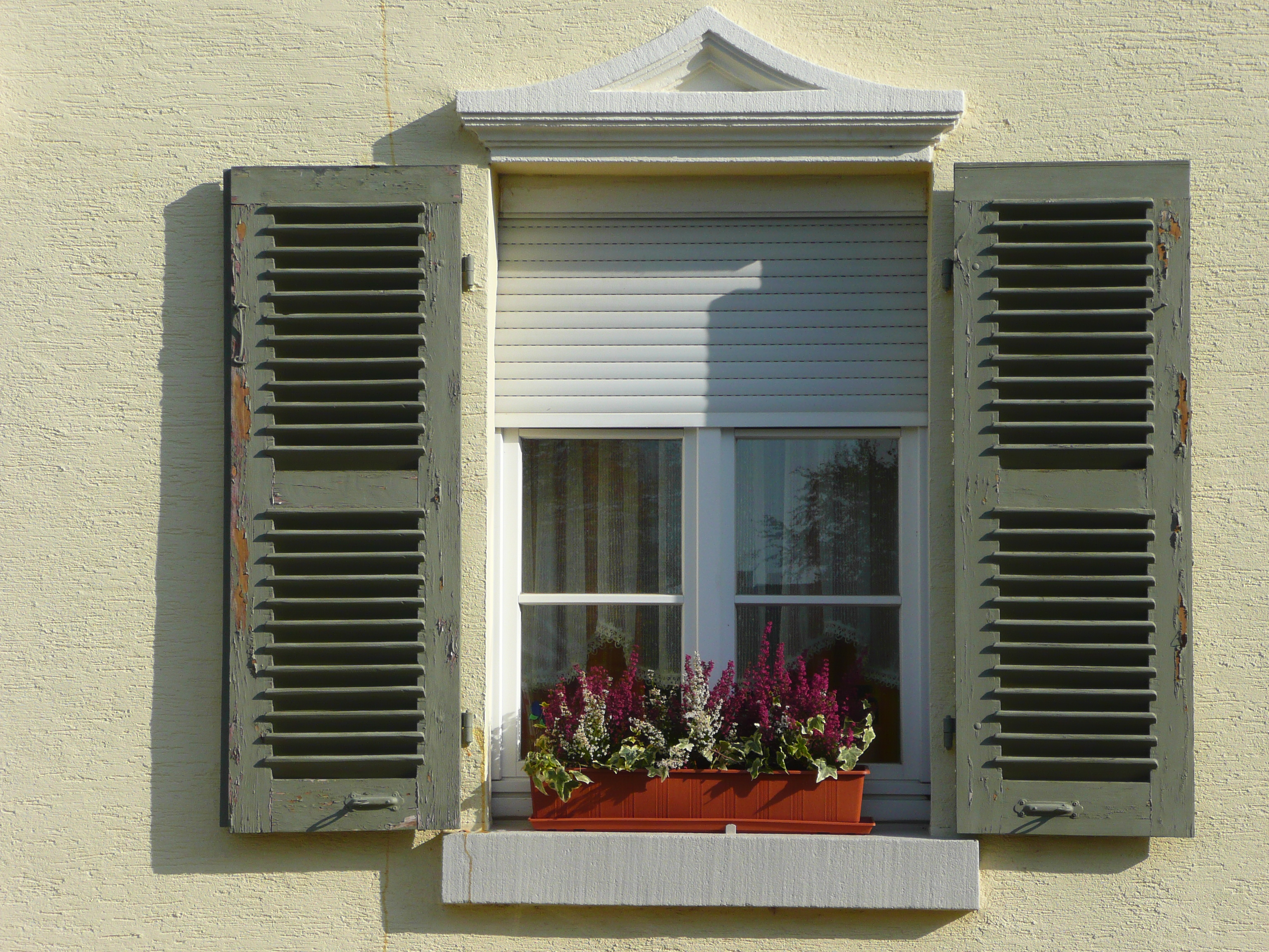 Fenster mit Fensterläden und einem Rolladen in einem typischen Siedlungshaus im Heidelberger Stadtteil Pfaffengrund (Baden-Württemberg, Deutschland)